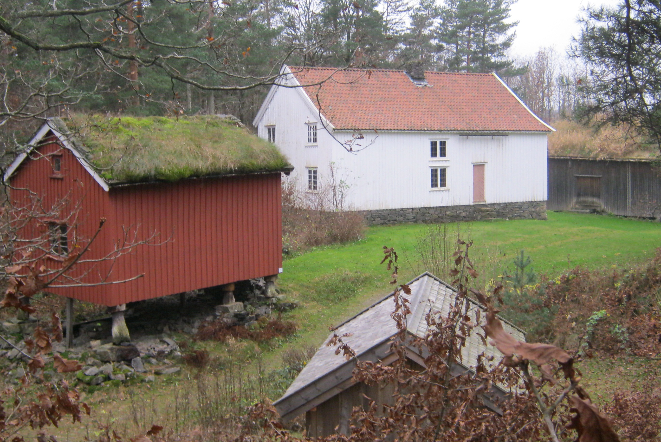 Vest-Agder-museet Kristiansand: Vest-Agdertunet (del)